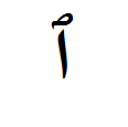 Das arabische Schriftzeichen Wasla auf dem Buchstaben Alif.